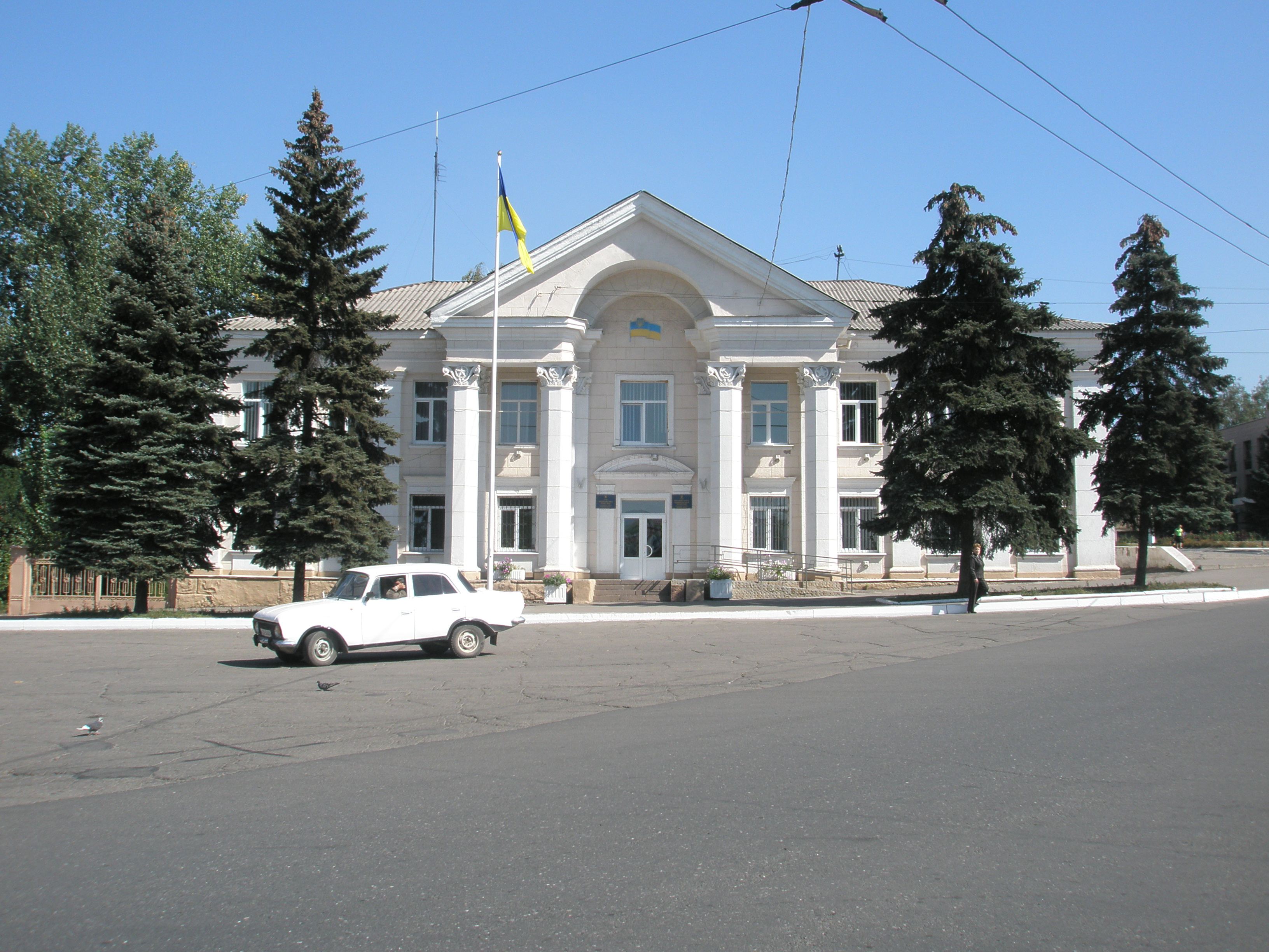 Перевальский городской совет.